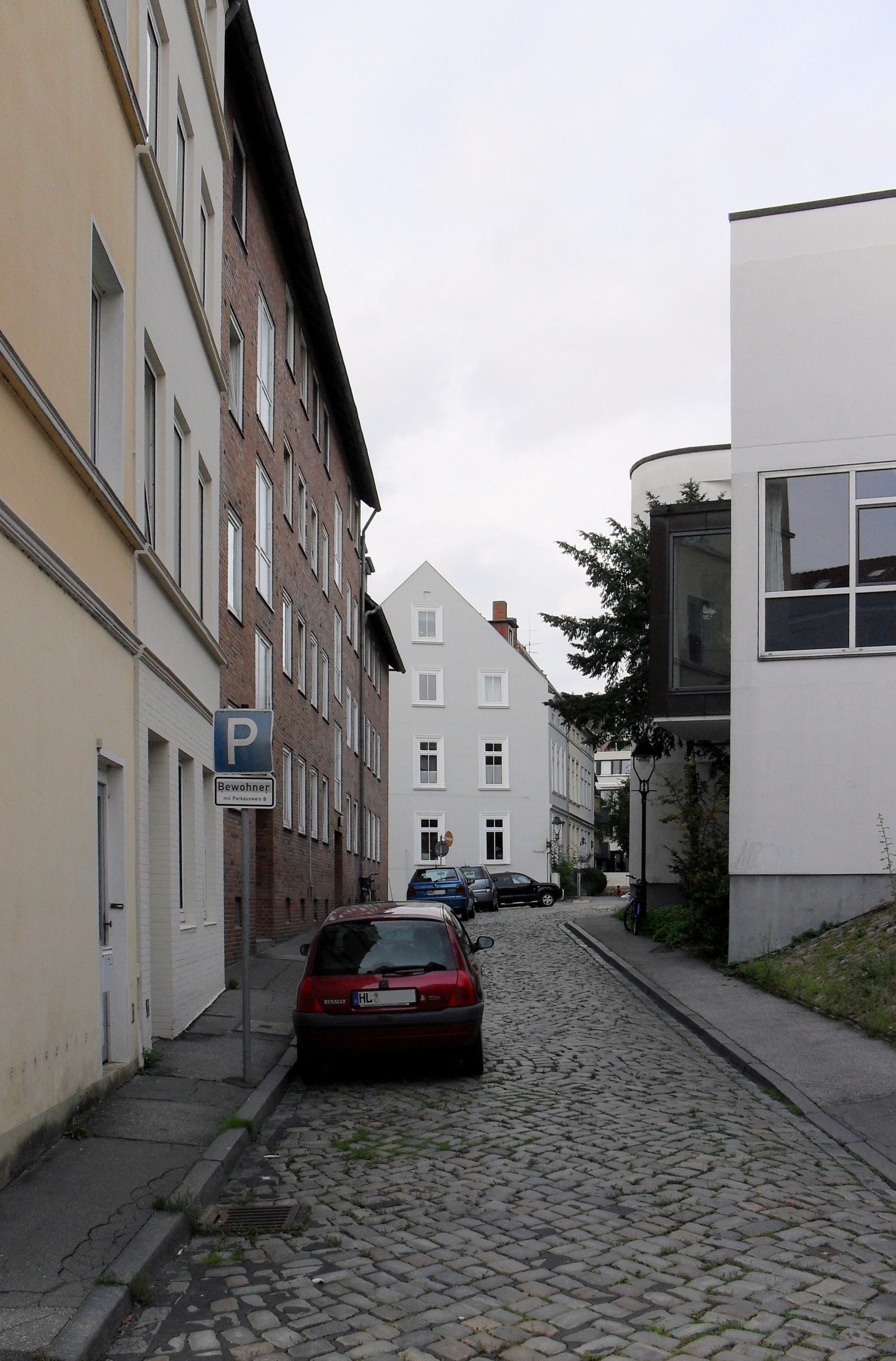 Der Kleine Bauhof in Lübeck